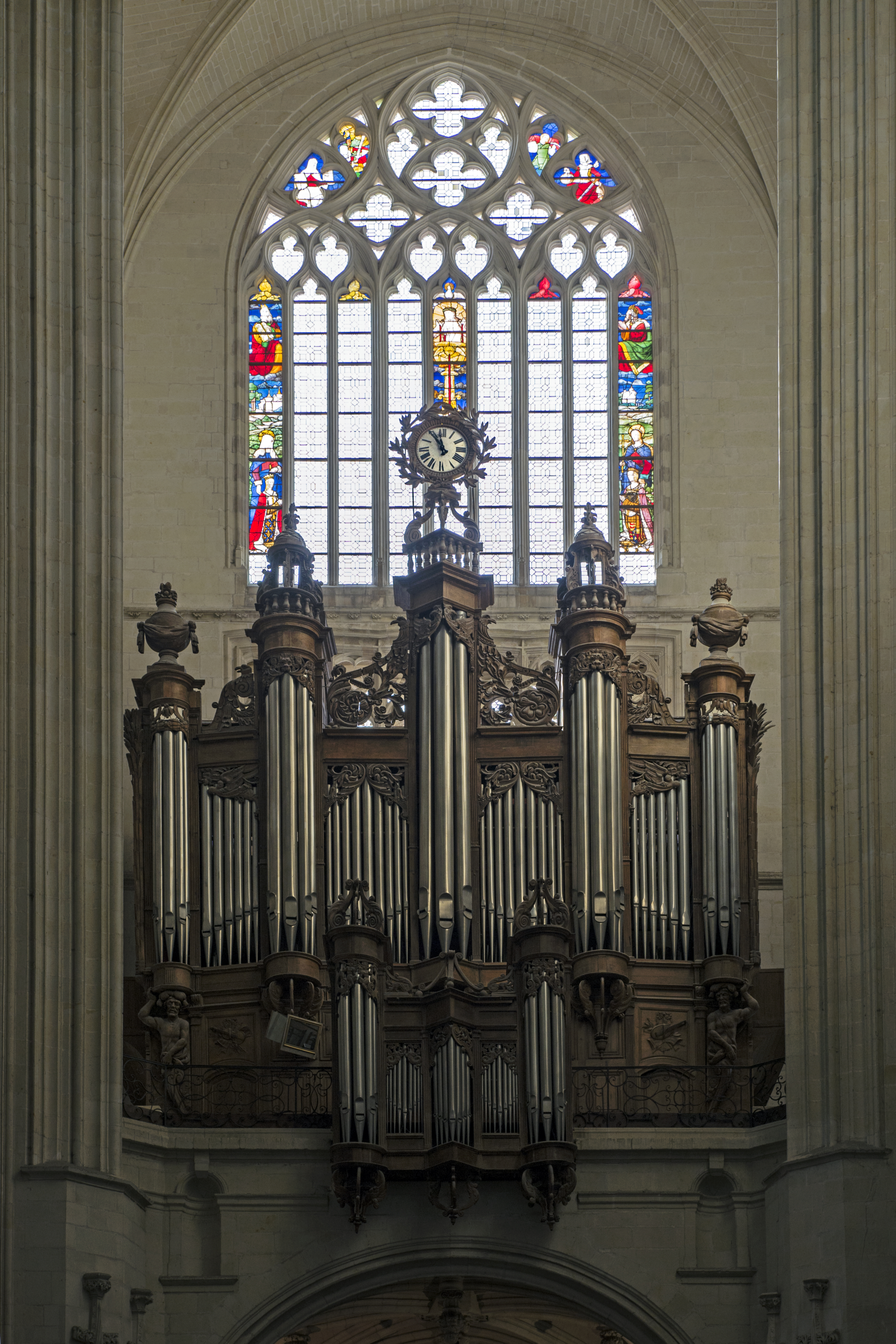 Grandes orgues de la cathédrale Saint-Pierre de Nantes.